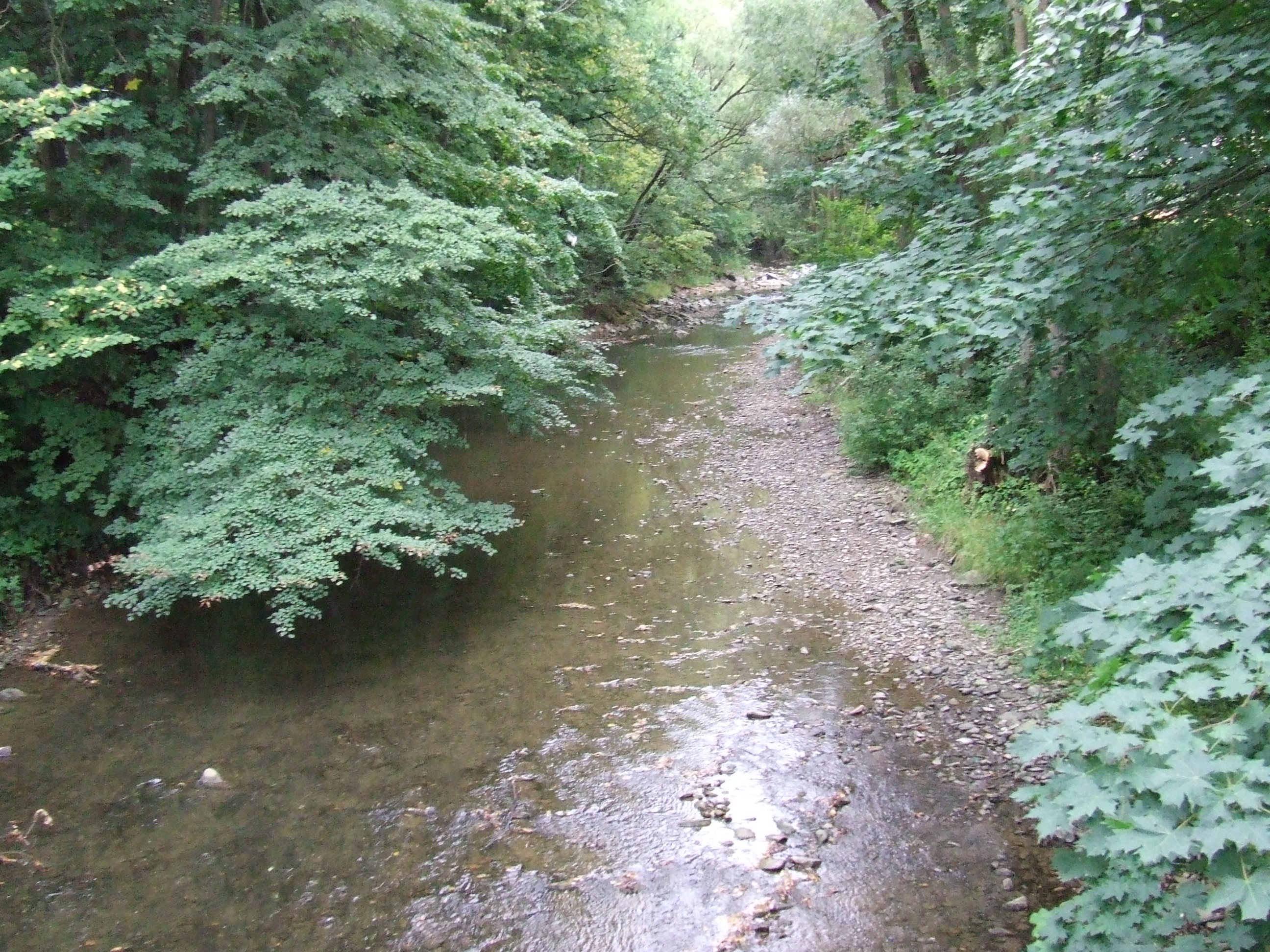 Rzeka Lipnik przy ujściu do Dunajca